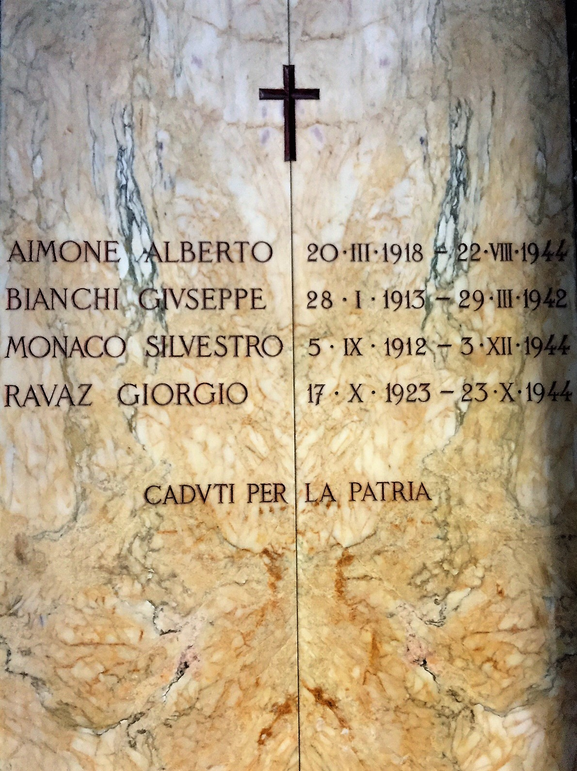 Nell'atrio d'ingresso dell'attuale Istituto Beccari (Torino) si trova la presente lastra commemorativa in memoria di combattenti caduti per la patria nel corso della Seconda guerra mondiale. Tra gli altri il partigiano Giorgio Ravaz.